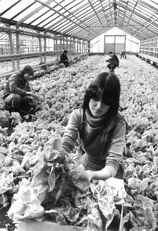 Blick in ein Treibhaus ADN-ZB Pätzold-18.3.85 Bez. Schwerin: Salaternte. Den ersten Salat ernten dieser Tage die Gärtnerlehrlinge eines Jugendkollektivs des VEG Warnitz. Zu ihnen gehört auch Carola Reith. Auf den dadurch freiwerdenden 92 Quadratmetern Gewächshausfläche wird anschließend Kohl angepflanzt, der später auf den Freilandflächen des Gemüseproduzenten gedeihen wird.